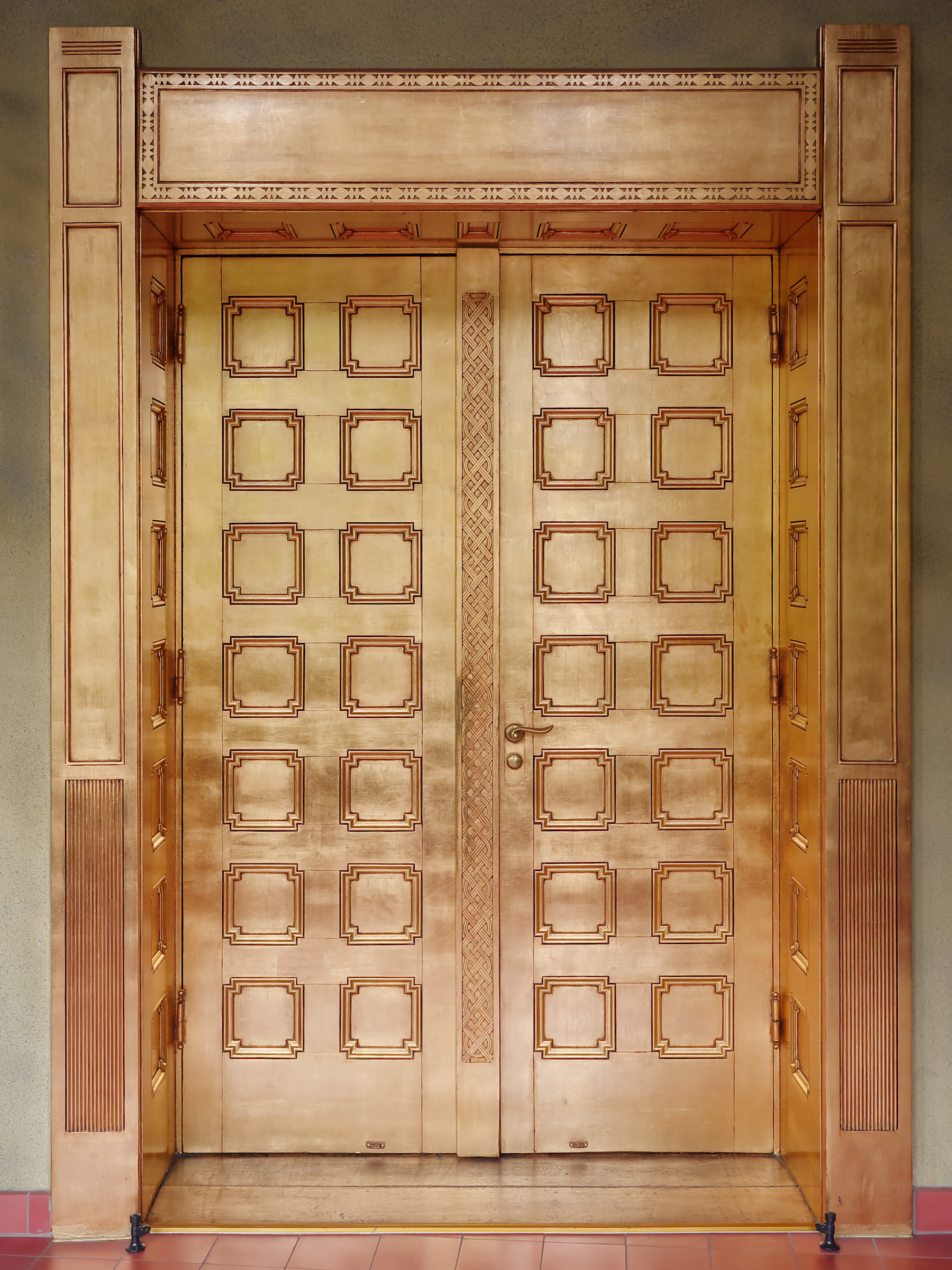 Eingangstür zur Aula im zweiten Obergeschoss des Instituts für Kirchenmusik der Universität der Künste Berlin in der Hardenbergstraße 41.